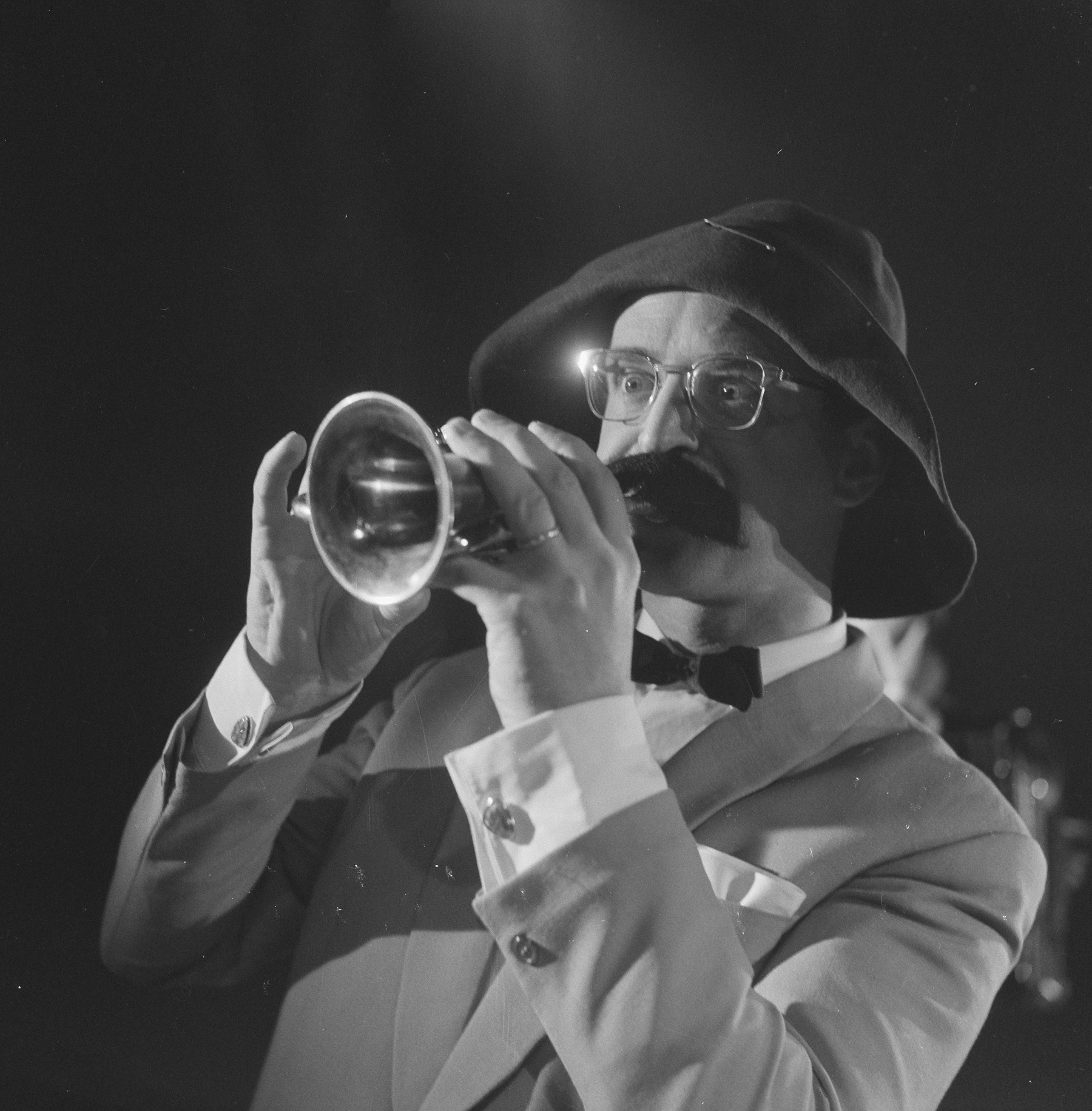 Collectie / Archief : Fotocollectie Anefo Reportage / Serie : [ onbekend ] Beschrijving : Hazy Osterwald show Annotatie : Filmopnamen in Cinetone Studio van de Zwitserse muzikant Hazy Osterwald en zijn sextet Datum : 27 oktober 1961 Trefwoorden : jazz, muziekprogramma's Persoonsnaam : Osterwald, Hazy Fotograaf : Nijs, Jac. de / Anefo Auteursrechthebbende : Nationaal Archief Materiaalsoort : Negatief (zwart/wit) Nummer archiefinventaris : bekijk toegang 2.24.01.03 Bestanddeelnummer : 913-1095 Reacties Geplaatst door Maaike op 06 september 2013 - 19:13. Deels opgenomen in de Cinetone studio te Duivendrecht en uitgezonden vanuit de AVRO studio onder de naam 'Stereofonie'